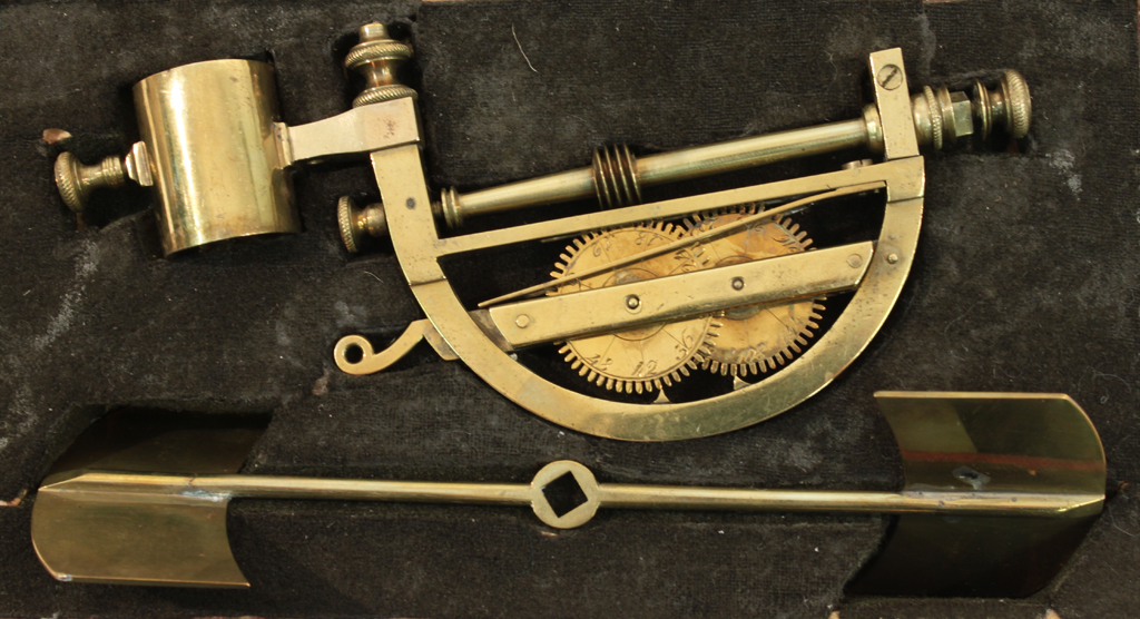 Woltmannscher Flügel, ein mobiles Strömungsmessgerät aus Messing in einem mit schwarzem Leder bezogenen Kasten, nach seinem Erfinder, Reinhard Woltman, benannt.